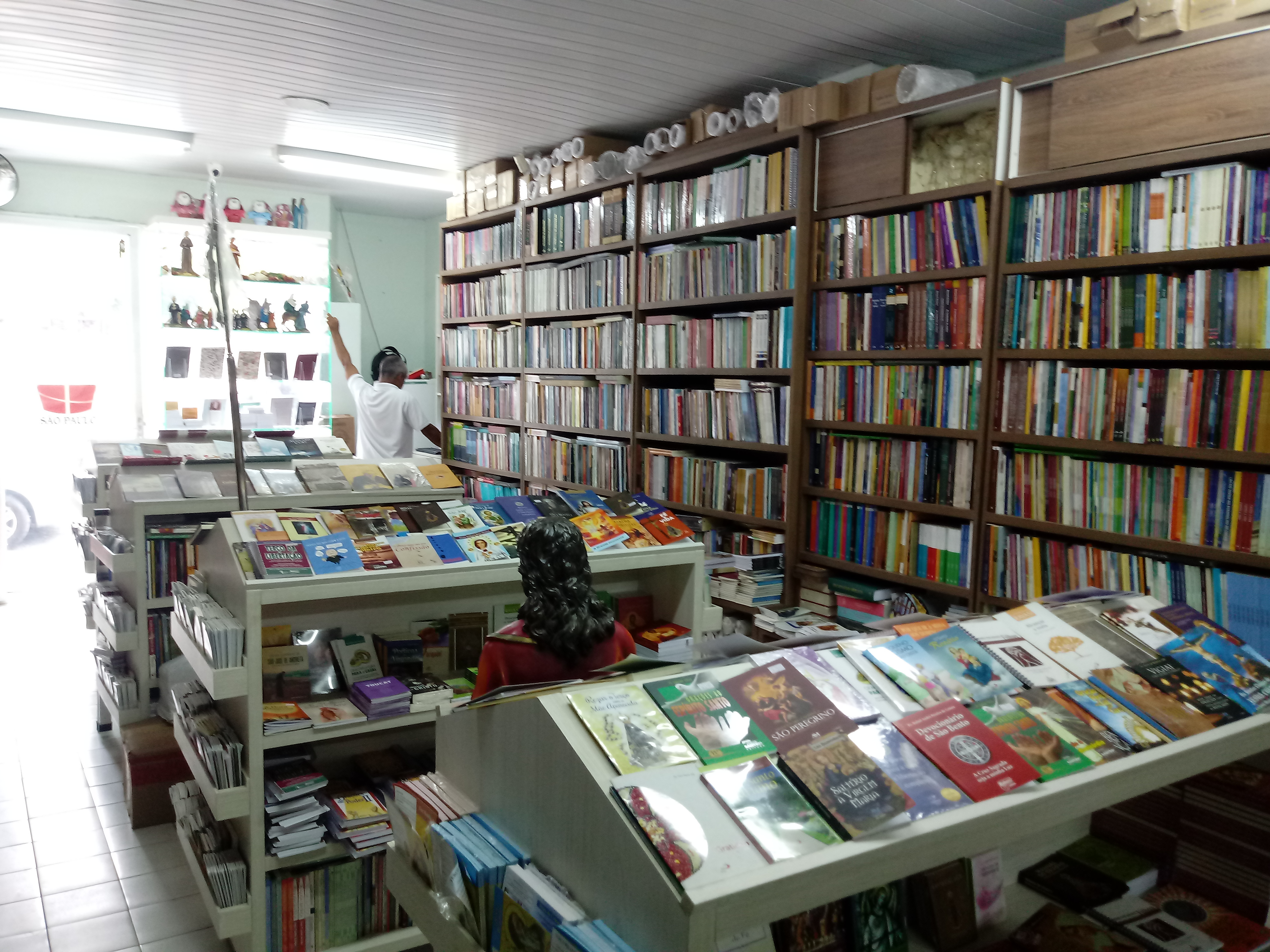 Livraria da Paulus Editora na praça Pedro II em Teresina, Piauí.